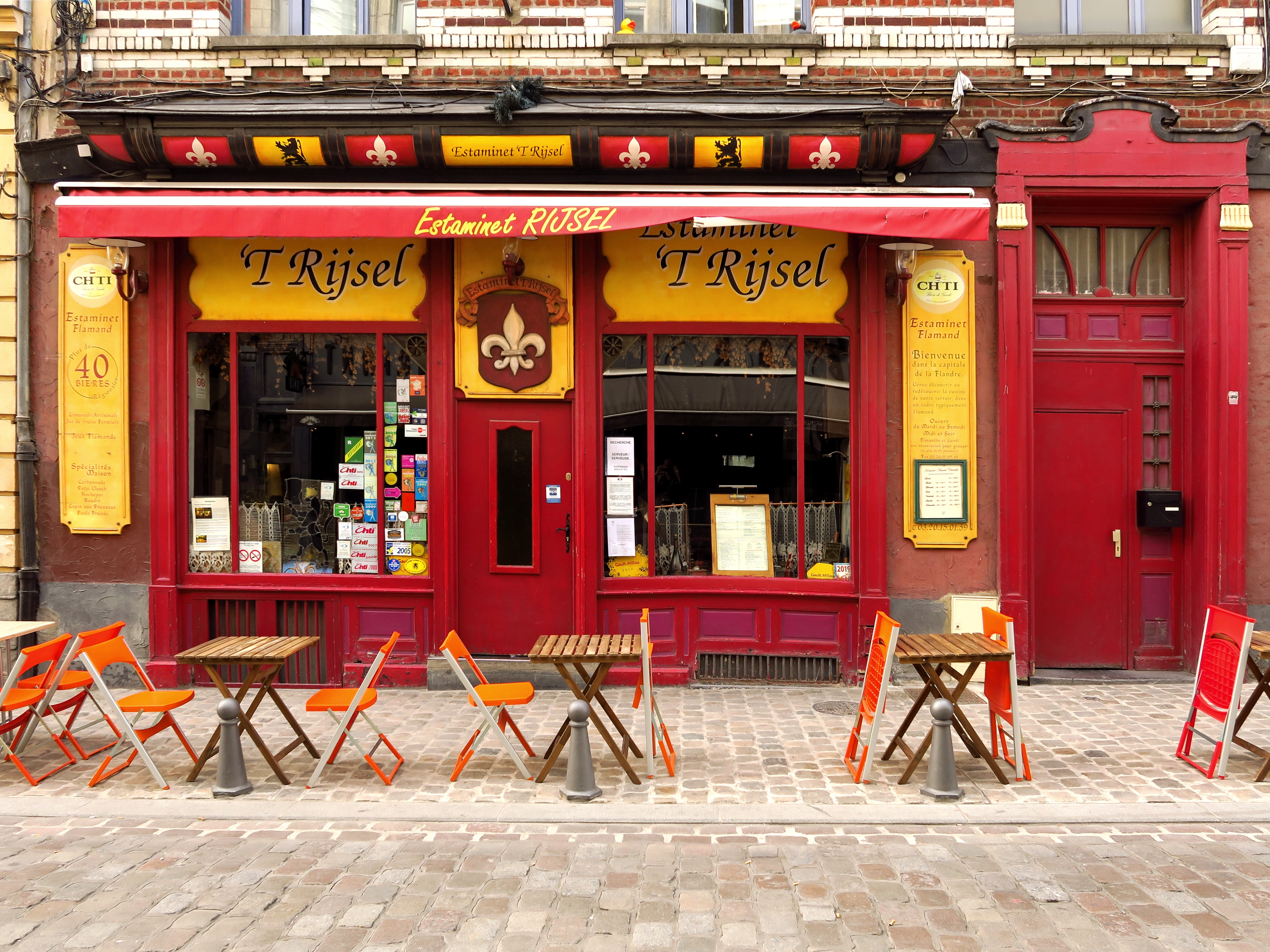 Lille (Nord, France) - Estaminet 'T Rijsel.